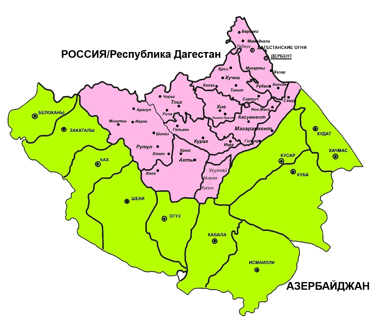 Малый Лезгистан по версии лезгинских националистов ((